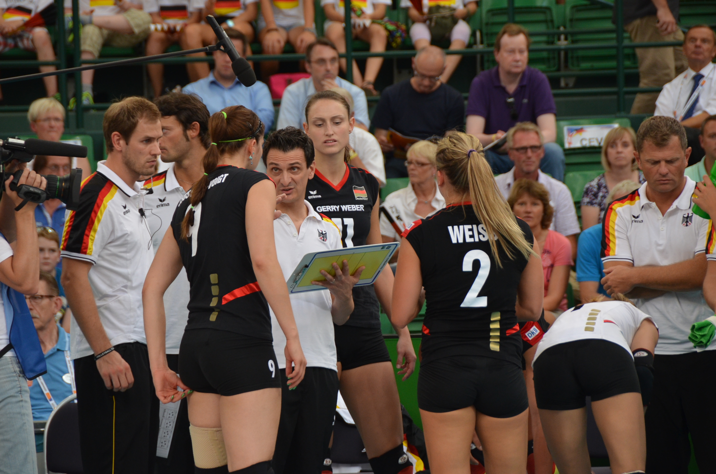 Volleyball-Europameisterschaft der Frauen 2013-Spielort Halle (Westf) Gerry-Weber-Stadion - Spiel 6. September 2013 (Deutschland-Spanien)